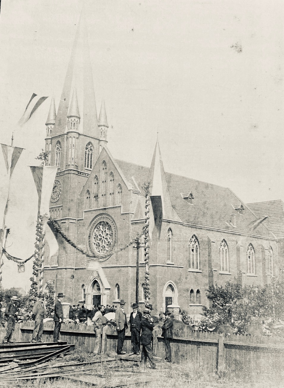 Einweihungsfeier der Christuskirche am 02.07.1903